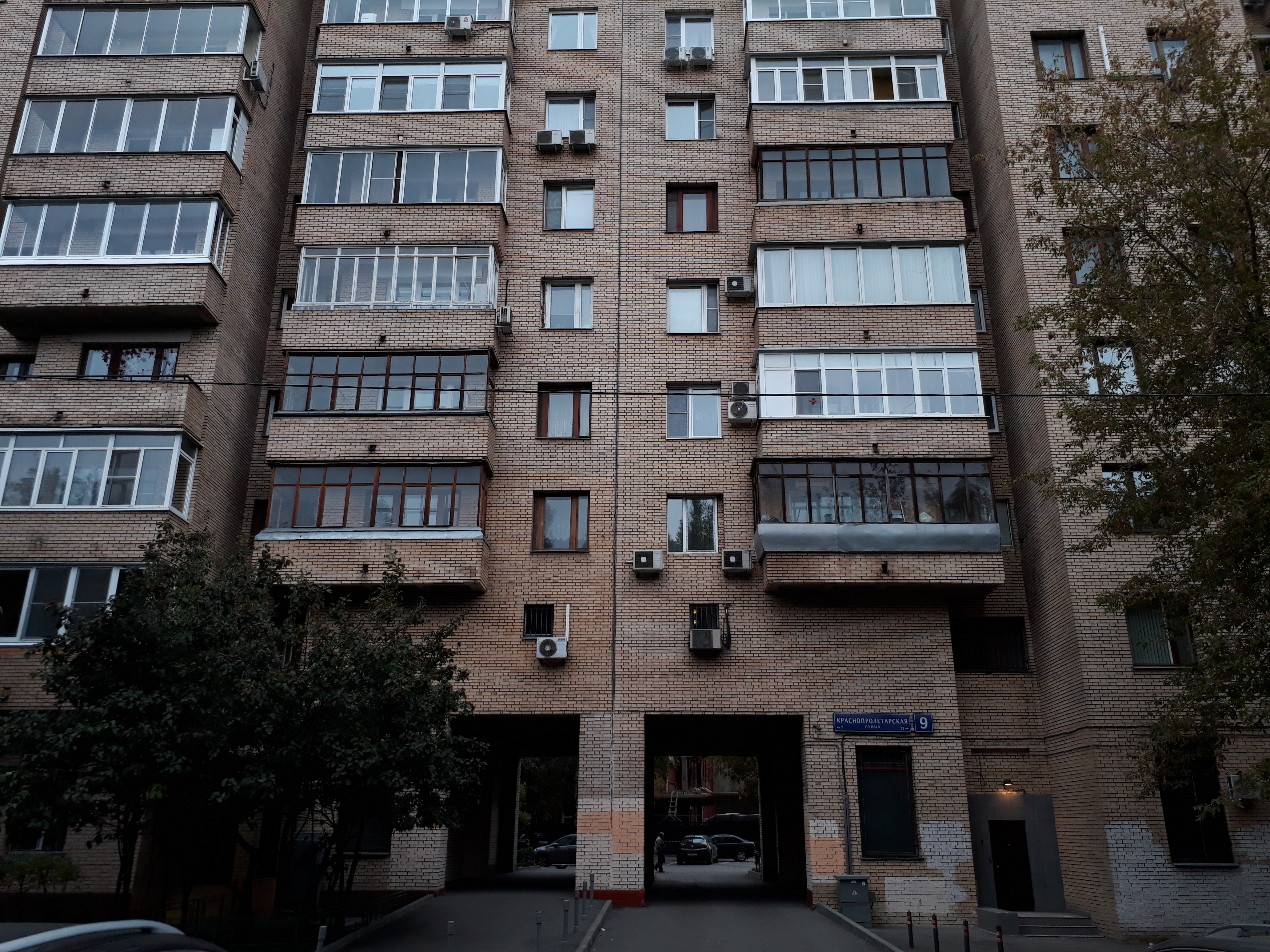 Дом №9 на Краснопролетарской улице, ст. м. "Новослободская", Москва. 29 сентября 2017г. В этом здании с 1995 по 2000 год располагалась редакция программы "Дорожный патруль", некогда имевшей популярность на российском канале ТВ-6.